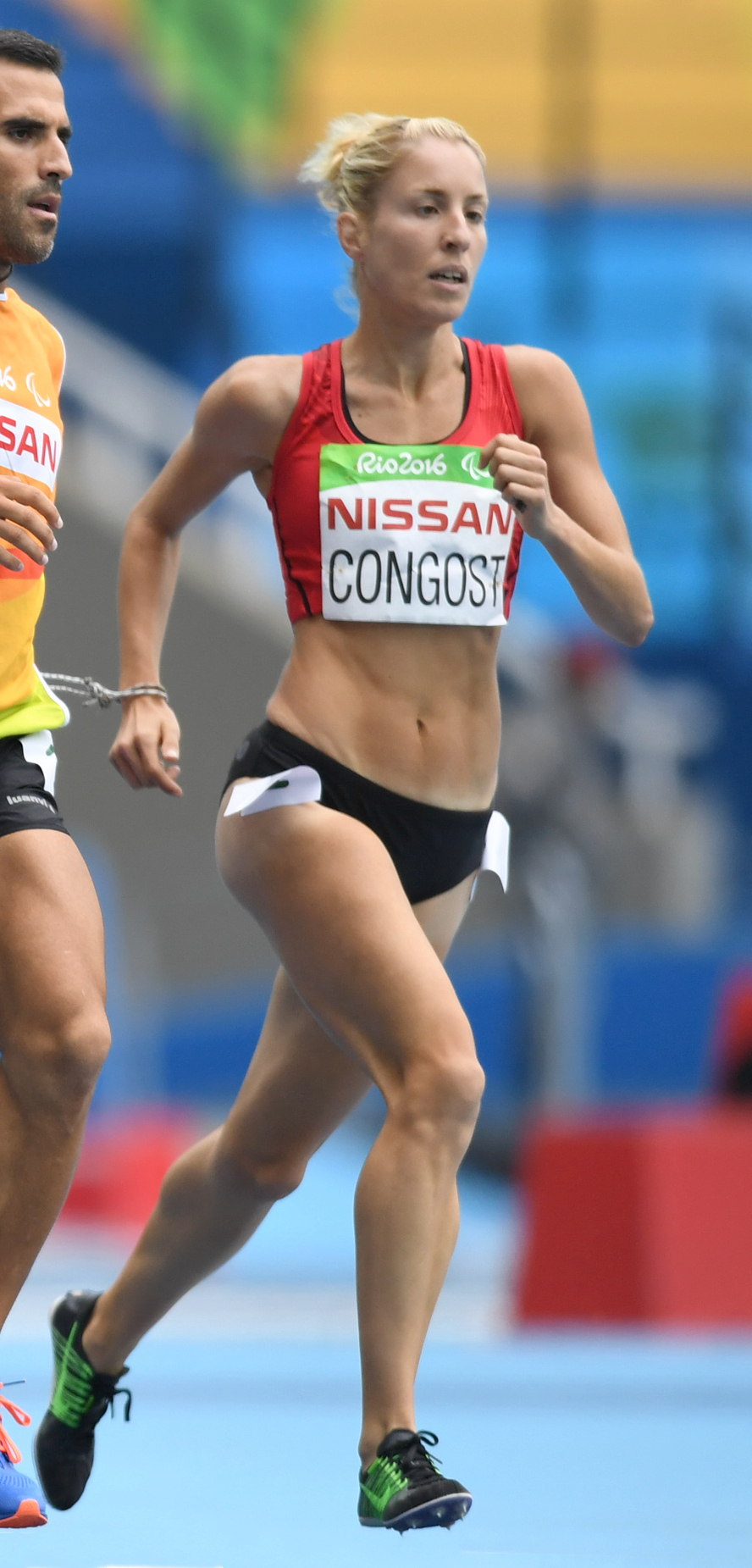 Rio de Janeiro - Primeiro dia das provas de atletismo nos Jogos Paralímpicos Rio 2016 (Tânia Rêgo/Agência Brasil)